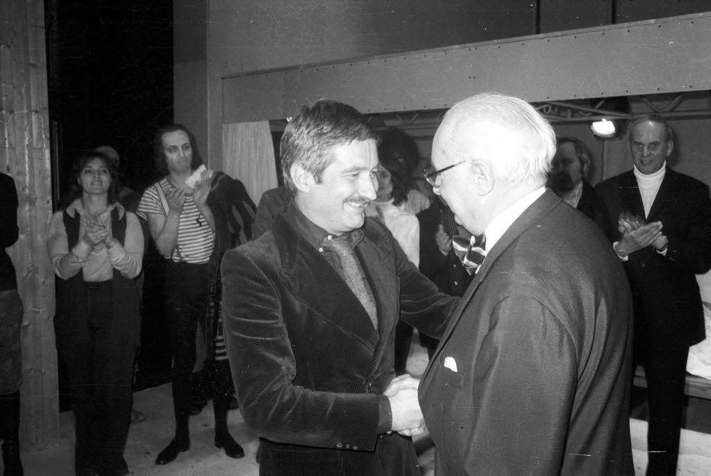 Dieter Reible (links) verlässt nach vier Jahren das Schauspielhaus und wird von Generalintendant Joachim Klaiber (rechts) verabschiedet.